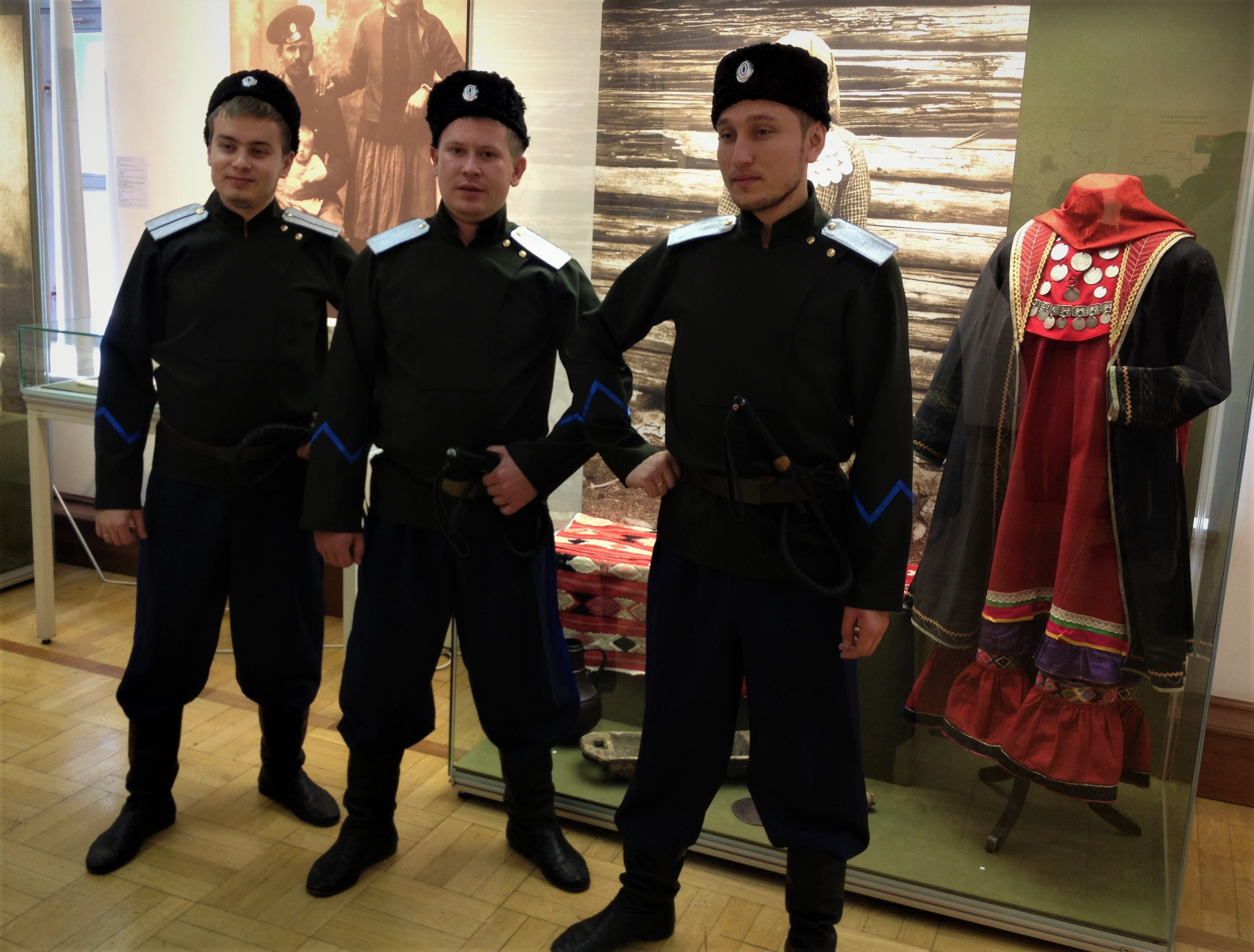 Нагайбаки на открытии выставки "Традиционная культура нагайбаков Южного Урала" (г. Казань, Кремль, Национальная художественная галерея «Хазинэ», 9 сентября 2016 г.).